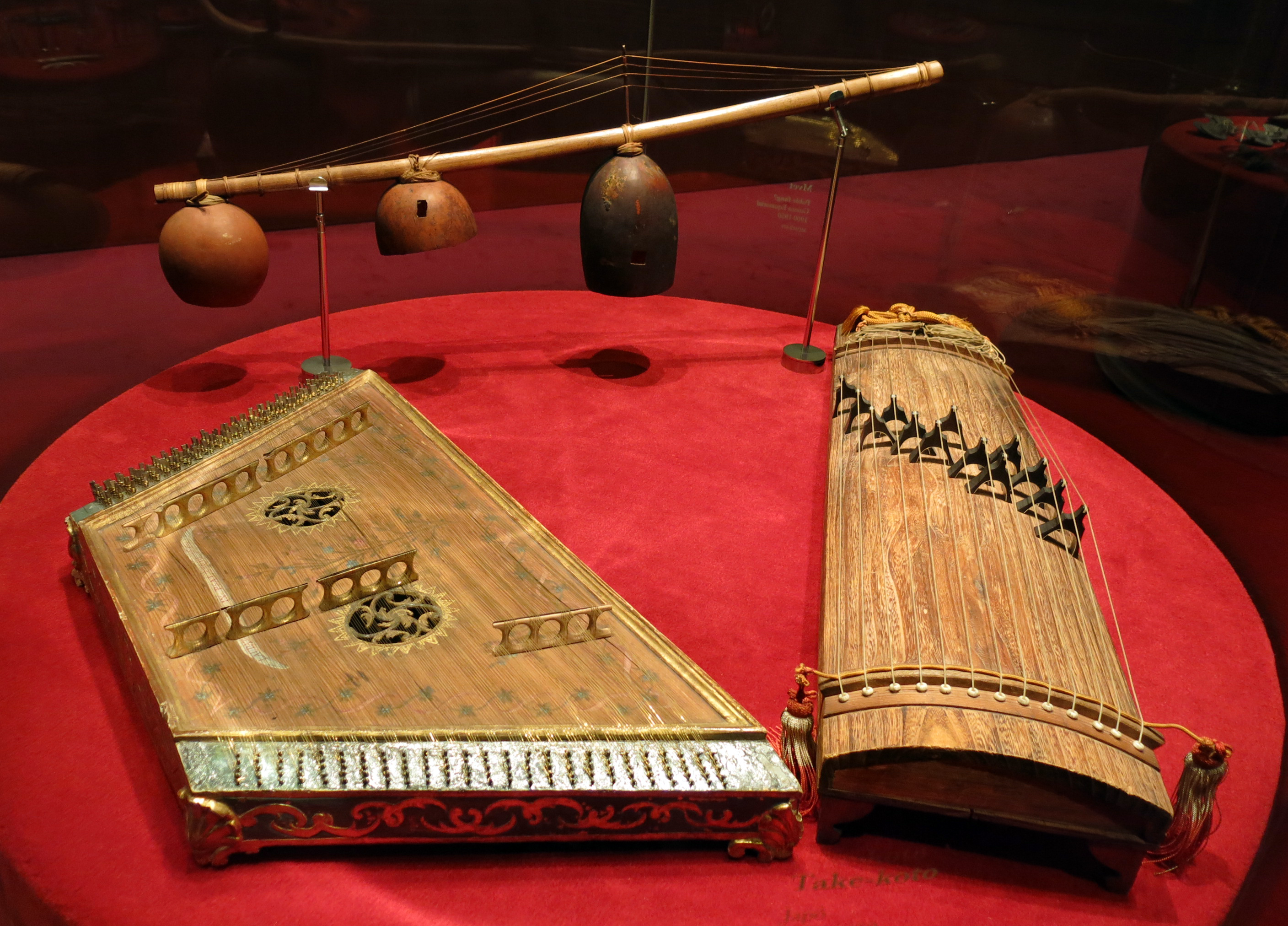 Saltiri. Espanya. Segle XVIII. (MDMB 487)./ Mvet. Poble dels Fang. Guinea Equatorial. Primera meitat segle XX (MDMB 679)./ Take - koto. Japó. Primera meitat segle XX (MDMB 714). Museu de la Música de Barcelona.